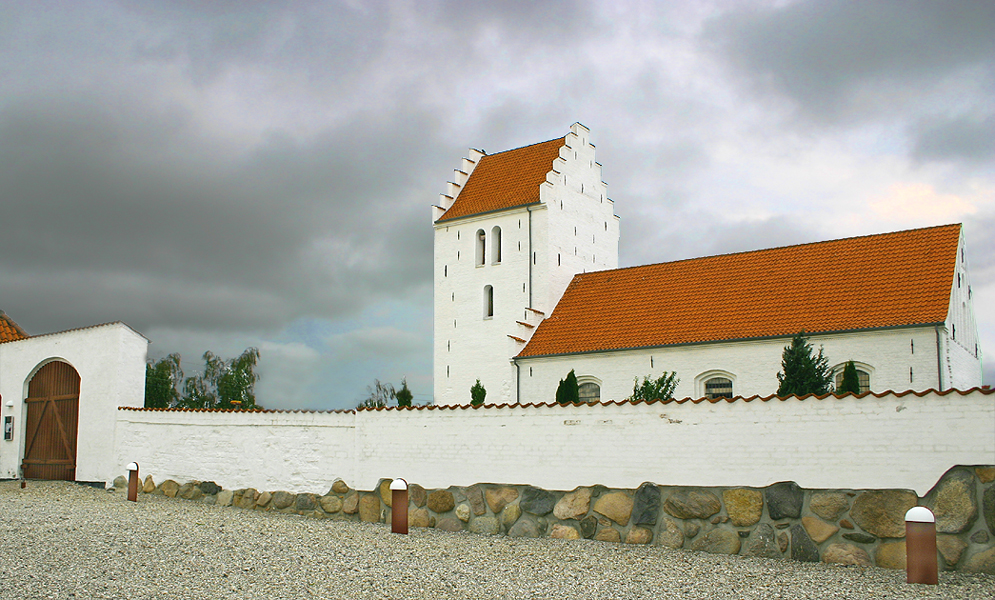 Gerlev kirke, Gerlev Sogn, Horns Herred, Frederiksborg Amt